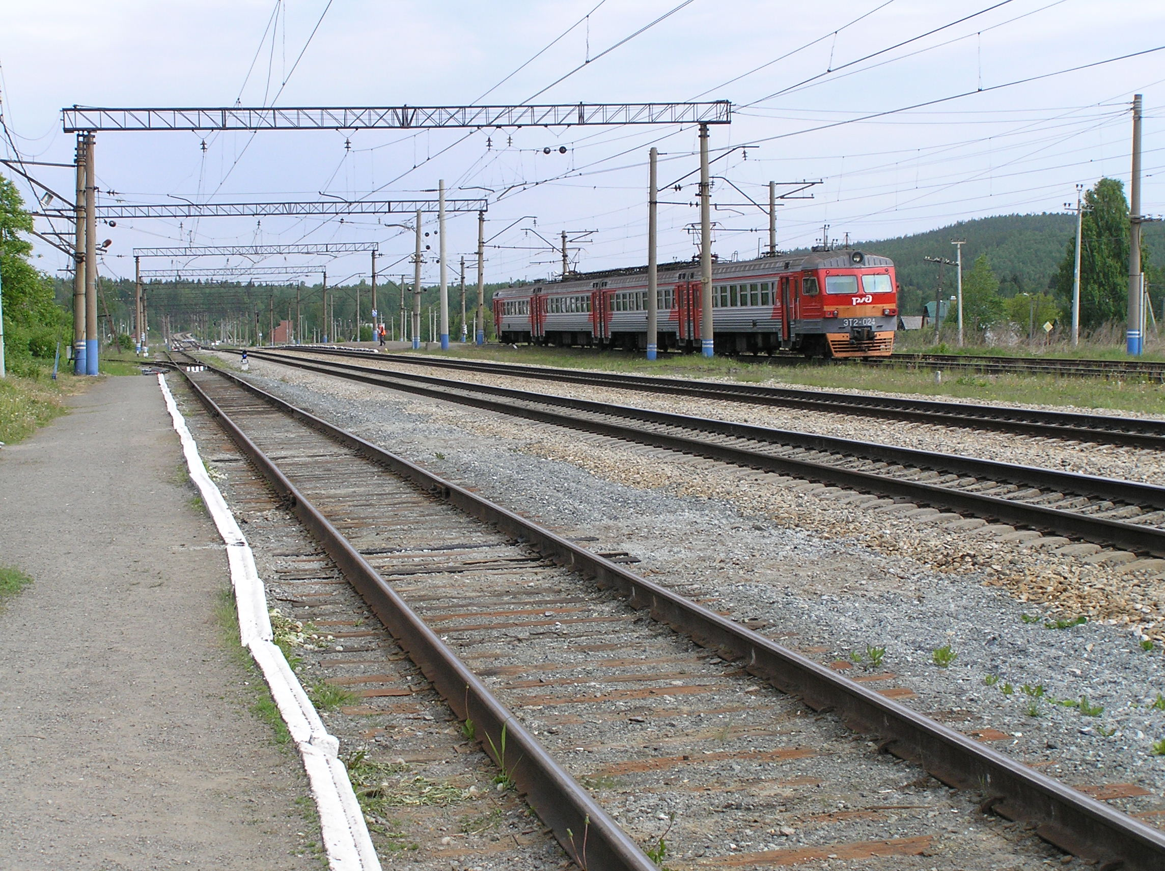 Электропоезд ЭТ2-024 на ст. Мурзинка, Свердловская ж.д.